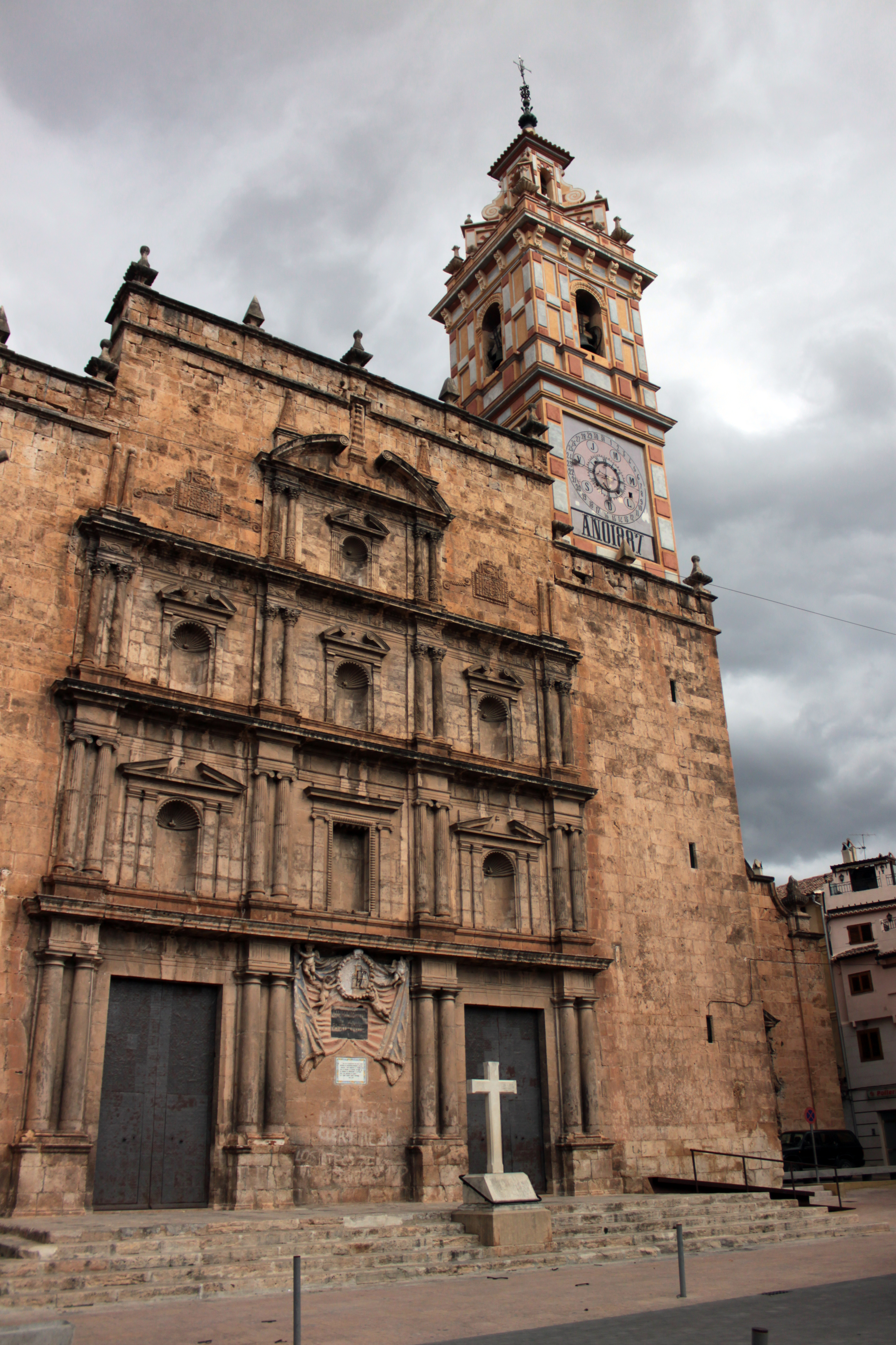 Iglesia de Nuestra Señora de los Ángeles de la localidad de Chelva, provincia de Valencia, Comunidad valenciana. España